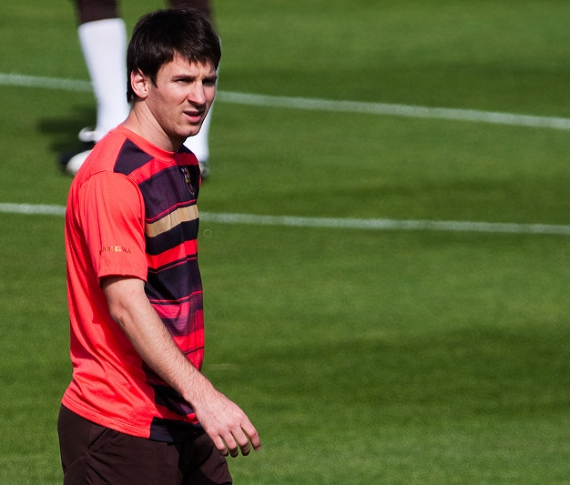 Entrenos antes de la épica de Roma.